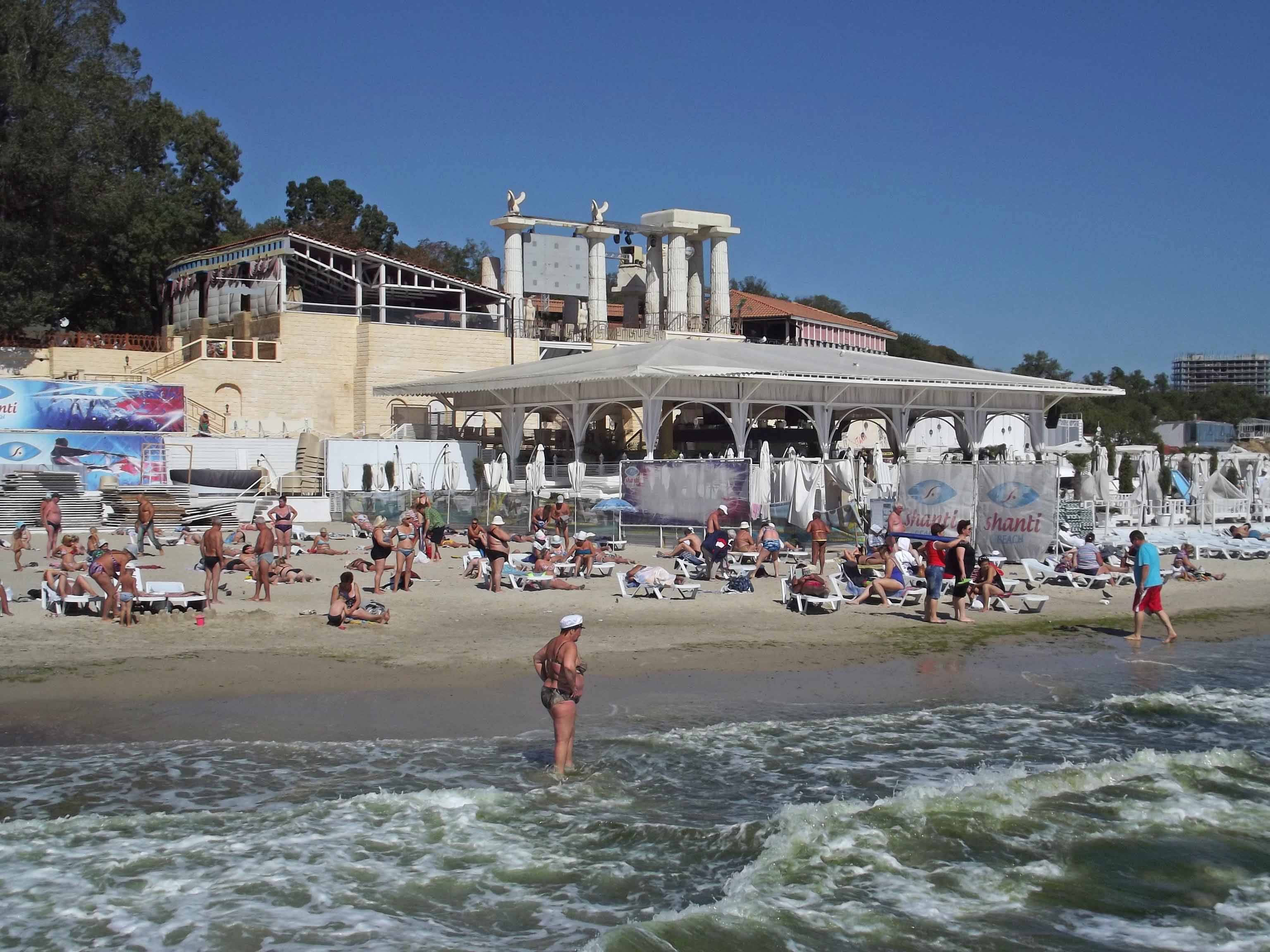 Пляж "Аркадия"